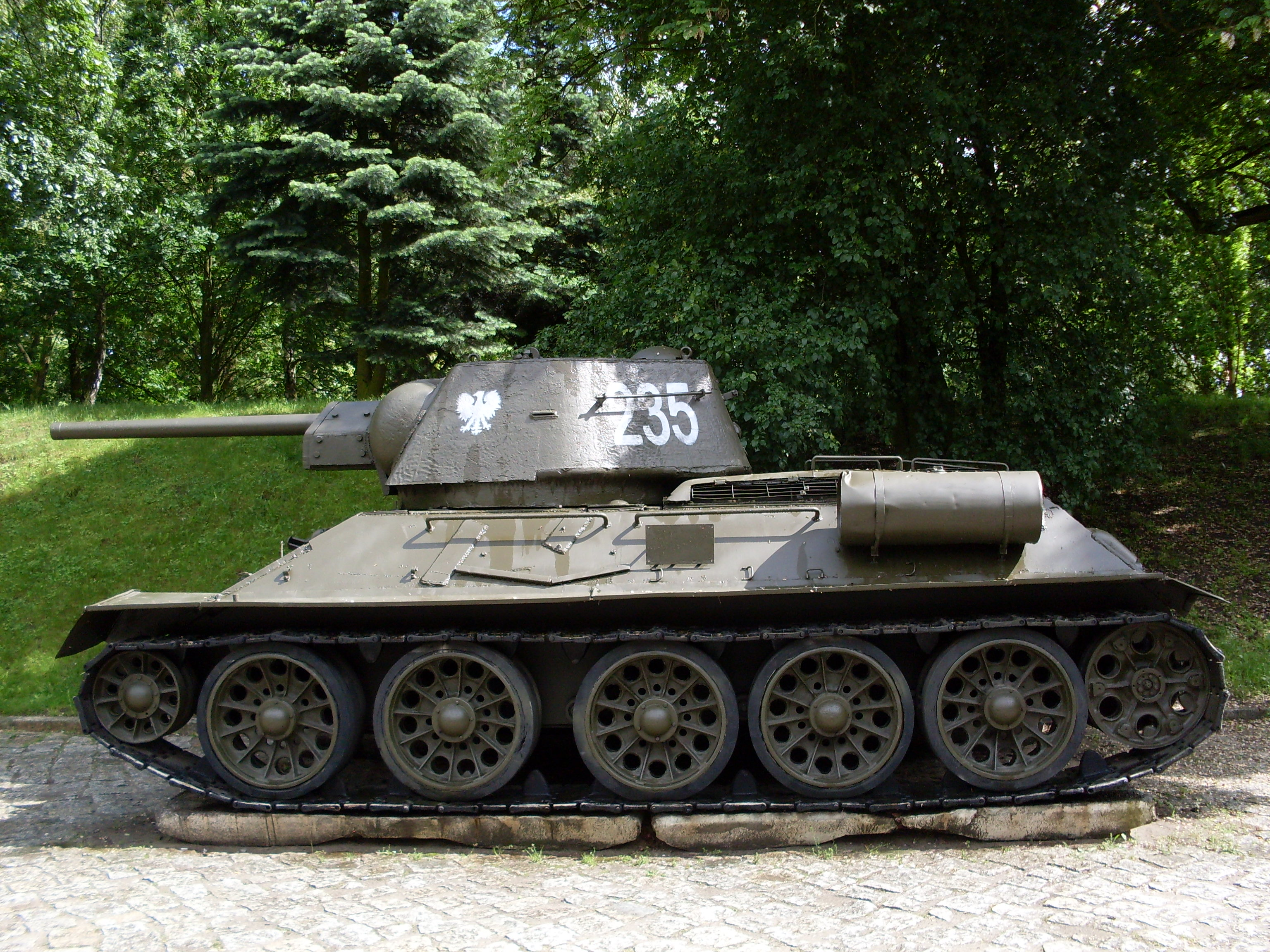 Czolg_sredni_T-34